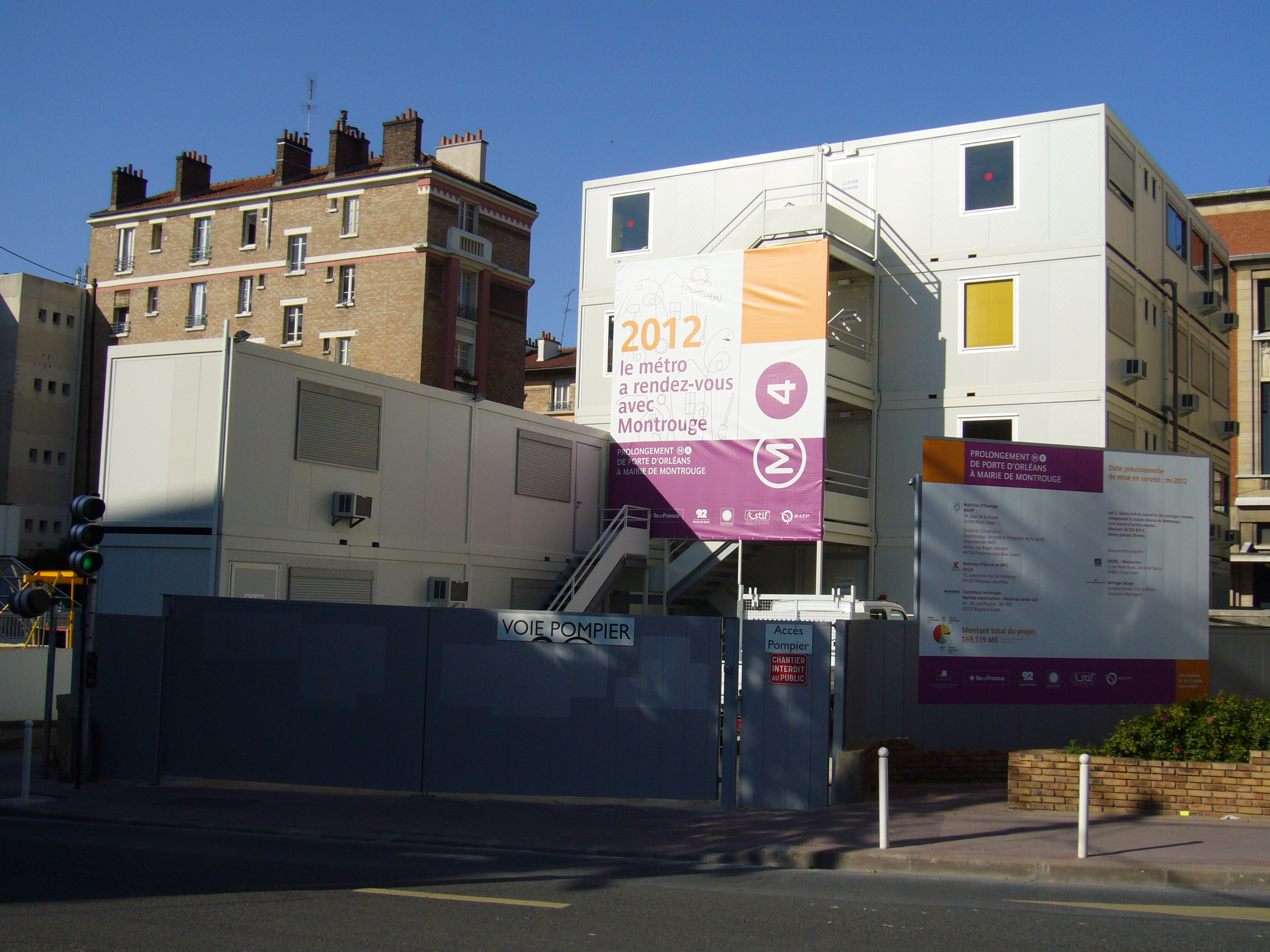 Baraques de chantier utilisés dans le cadre du chantier de construction du prolongement de la ligne 4 du métro parisien à Mairie de Montrouge.